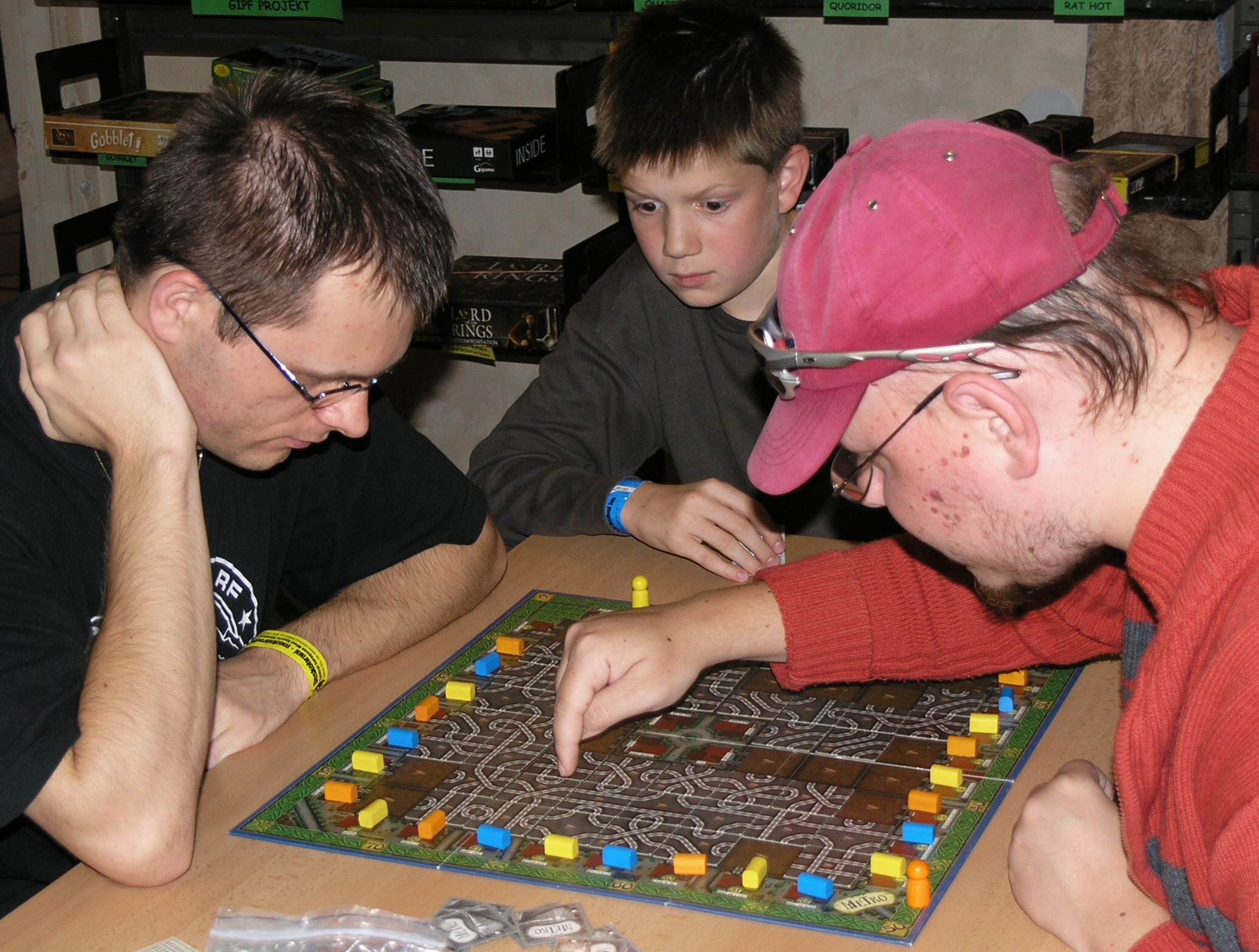 Deskohraní 2008